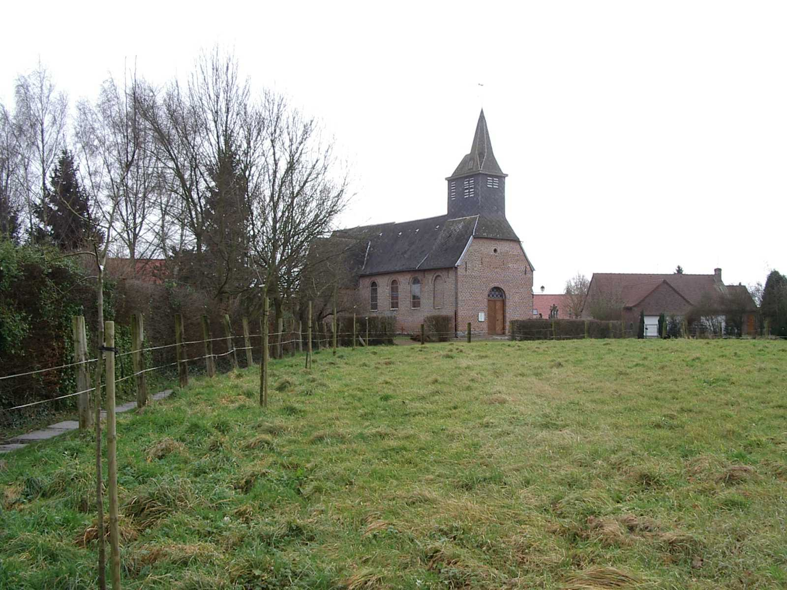 Eglise St-Amand de Cobrieux (59, France)